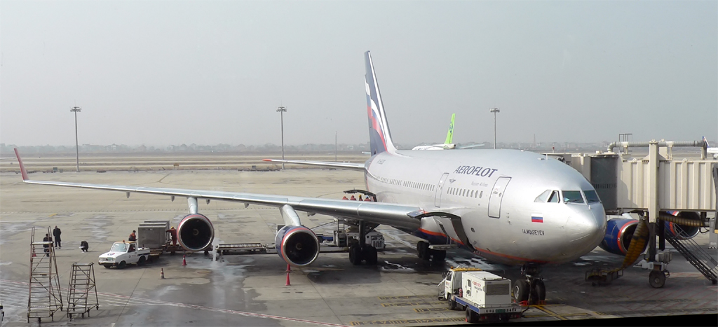 Bildbeschreibung: Il-96-300 auf dem Flughafen Shanghai Pudong International Quelle: selbst fotografiert Fotograf/Zeichner: Manuel Pajer Datum: 15.01.2006